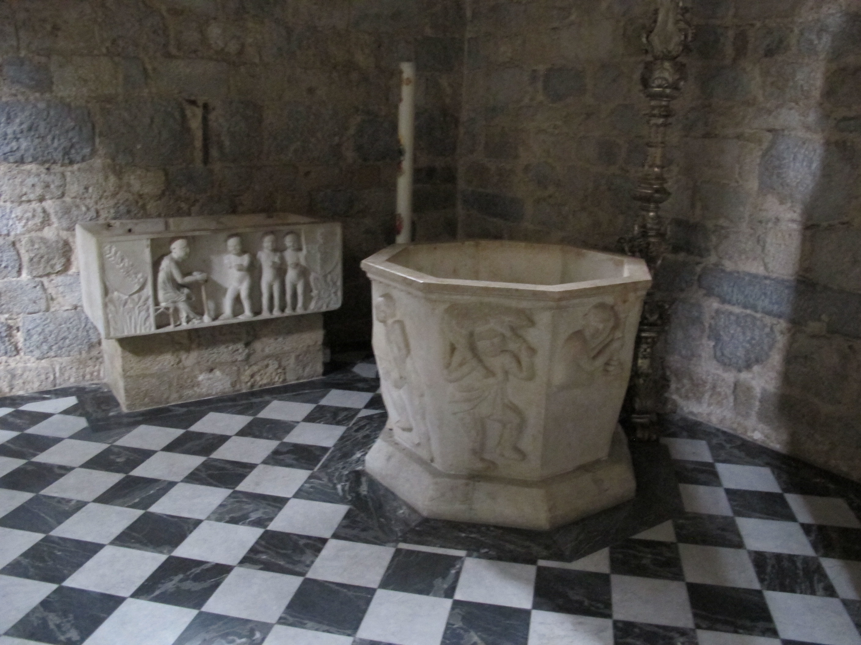 Camaiore, collegiata, fonte battesimale